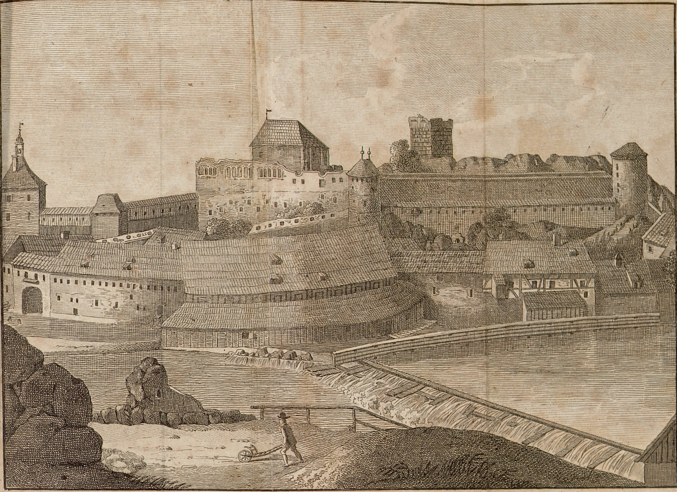 Burg Eger um 1790